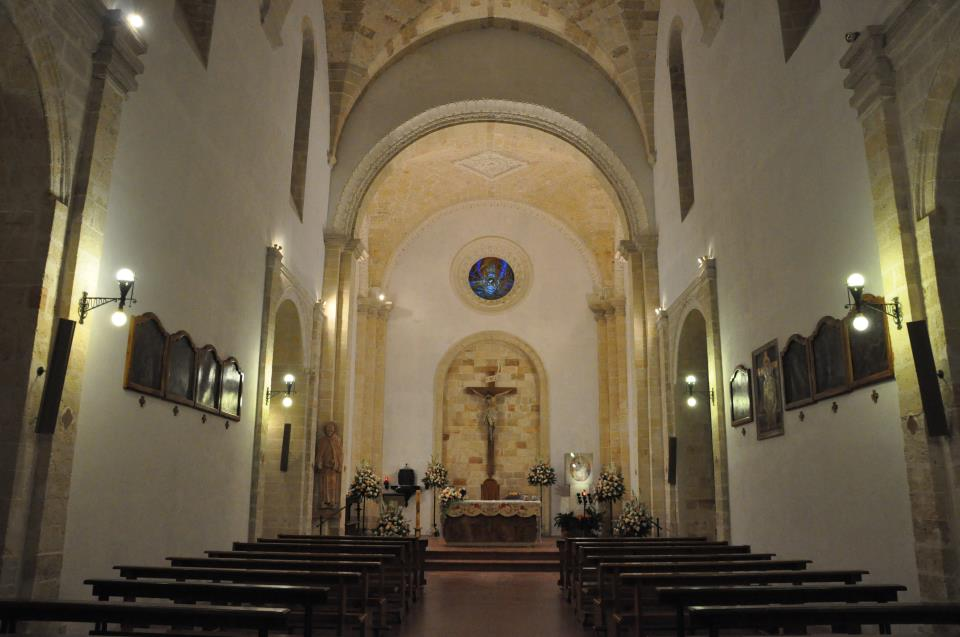 Interno chiesa della Grazia Galatone, Lecce